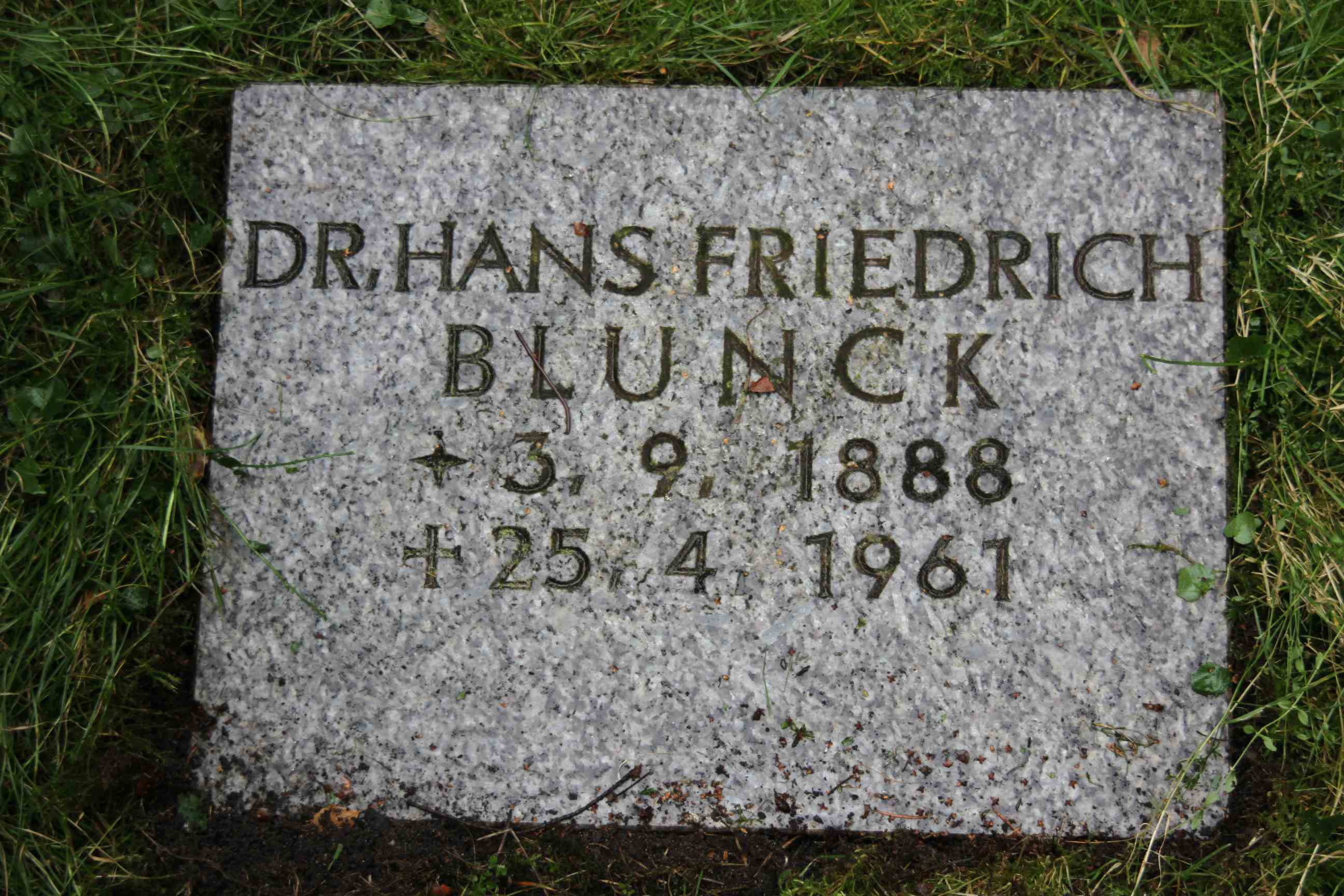 Hans Friedrich Blunck (* 3. September 1888 in Altona bei Hamburg; † 24. April 1961 ebenda) war ein deutscher Jurist und Schriftsteller. In der Zeit des Nationalsozialismus besetzte er verschiedene kulturpolitische Positionen.